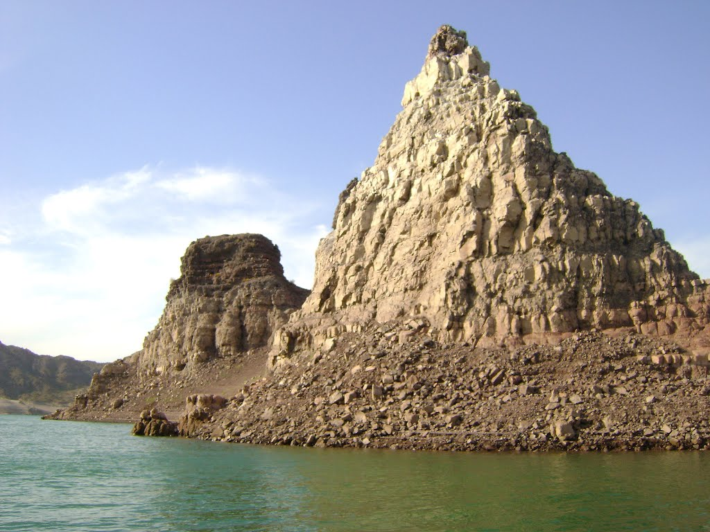 Se mapearon los afloramientos de la zona del Bloque San Rafael.